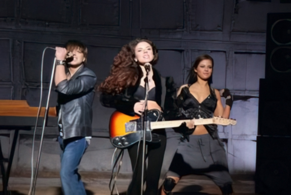 Анна Плетнёва на съёмках клипа Всего Хорошего